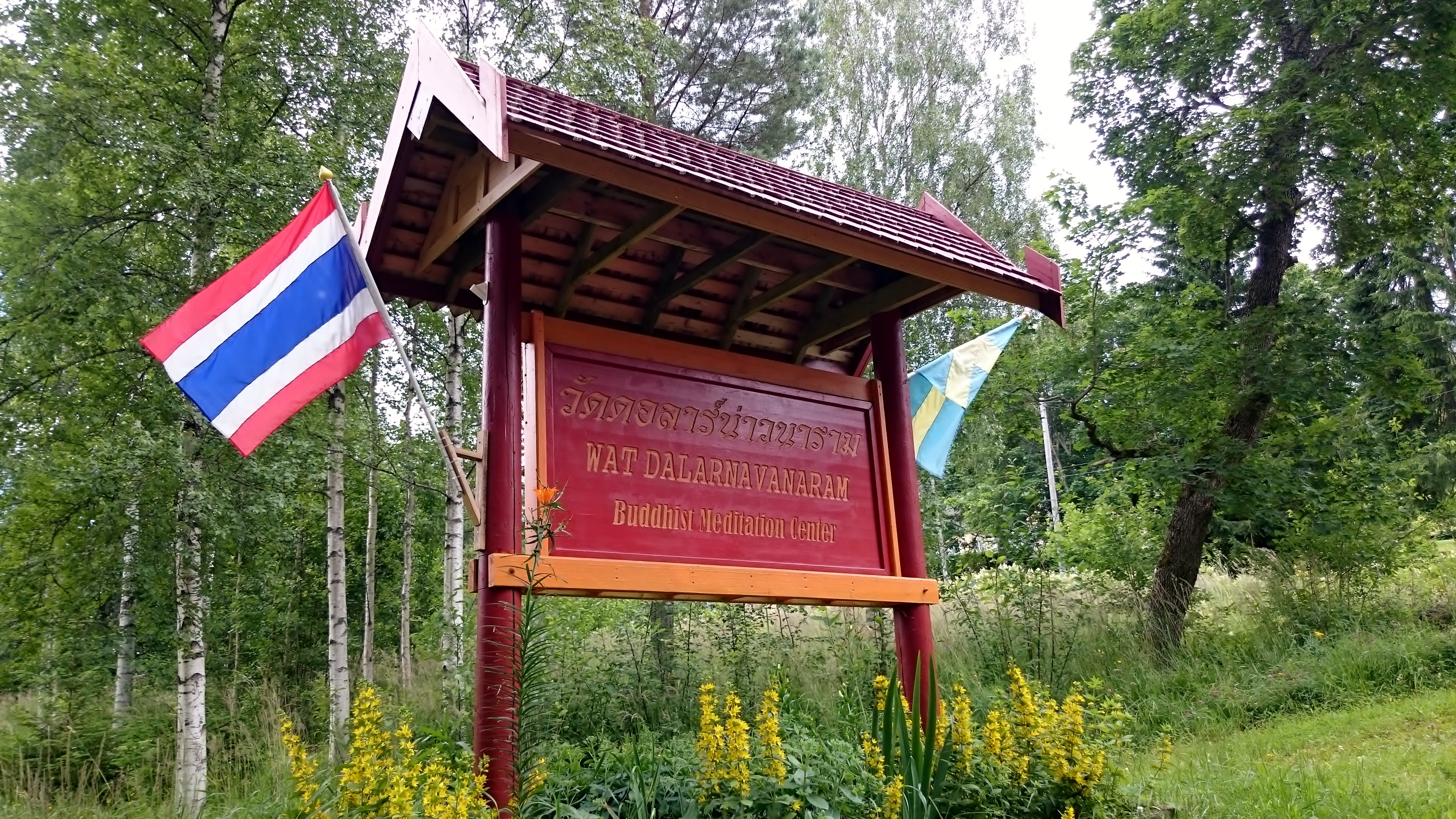 Buddhistiskt tempel i Ulvshyttan, Dalarna